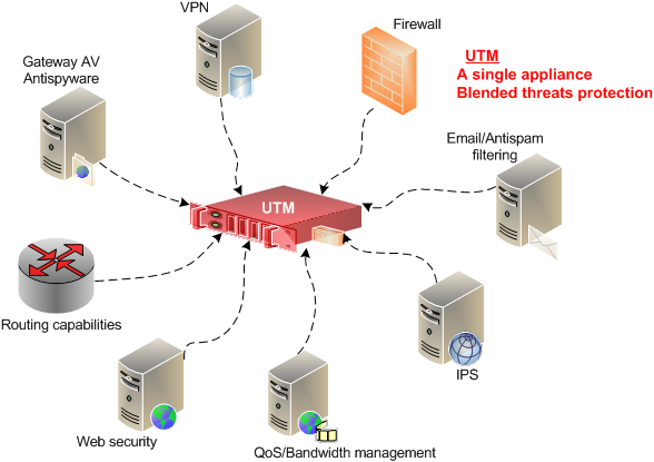 Монгол: utm